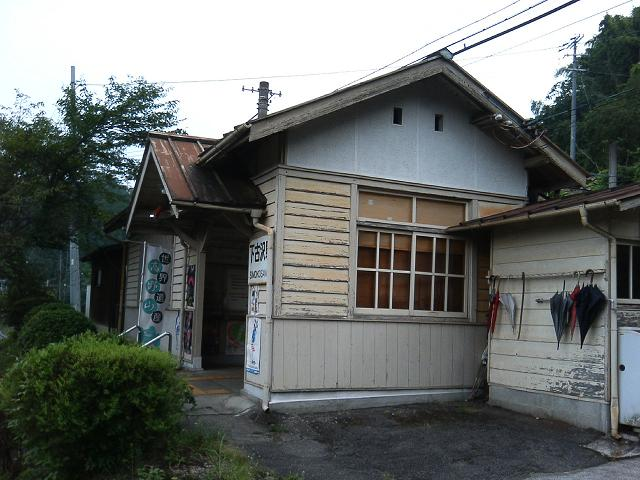 下古沢駅の駅舎 2005年8月13日K's撮影